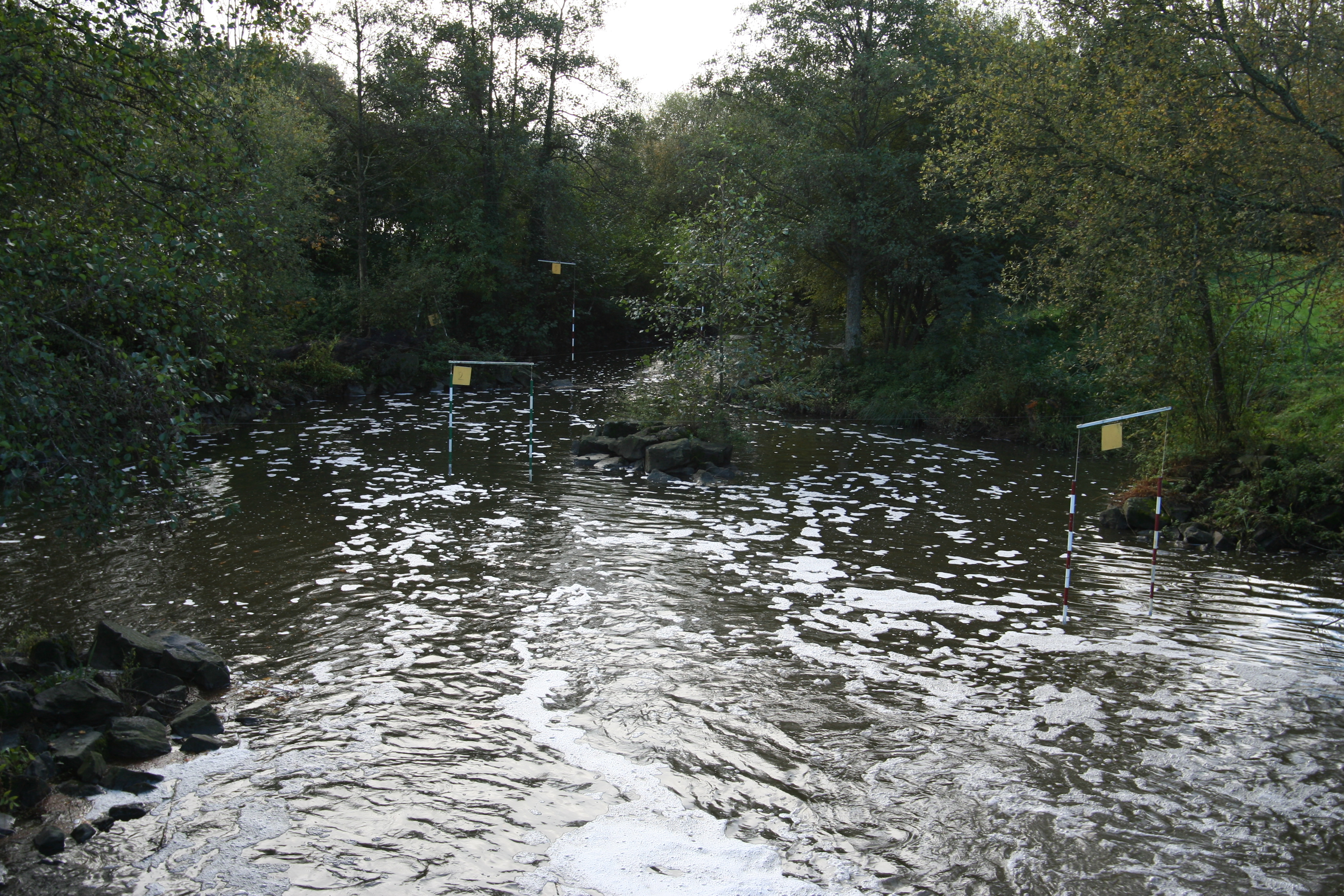 L'Ille à Betton.